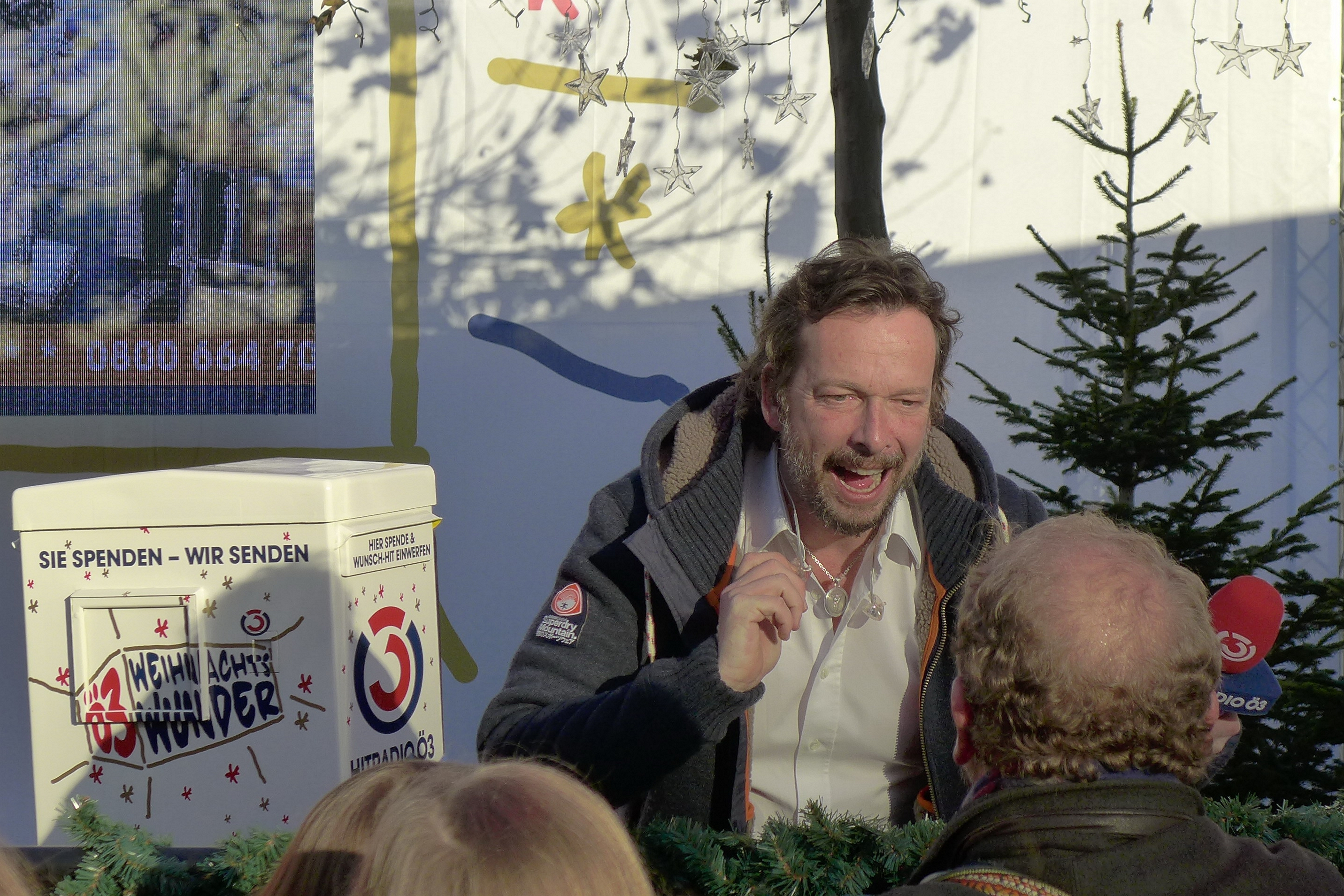 Robert Kratky, Ö3 Weihnachtswunder 2015, 22-12-2015